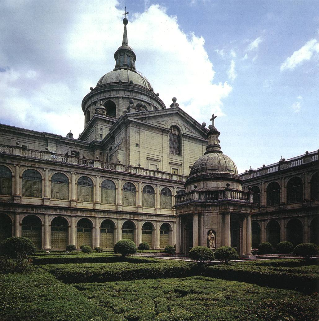 Patio de los Evangelistas - Monasterio de El Escorial.